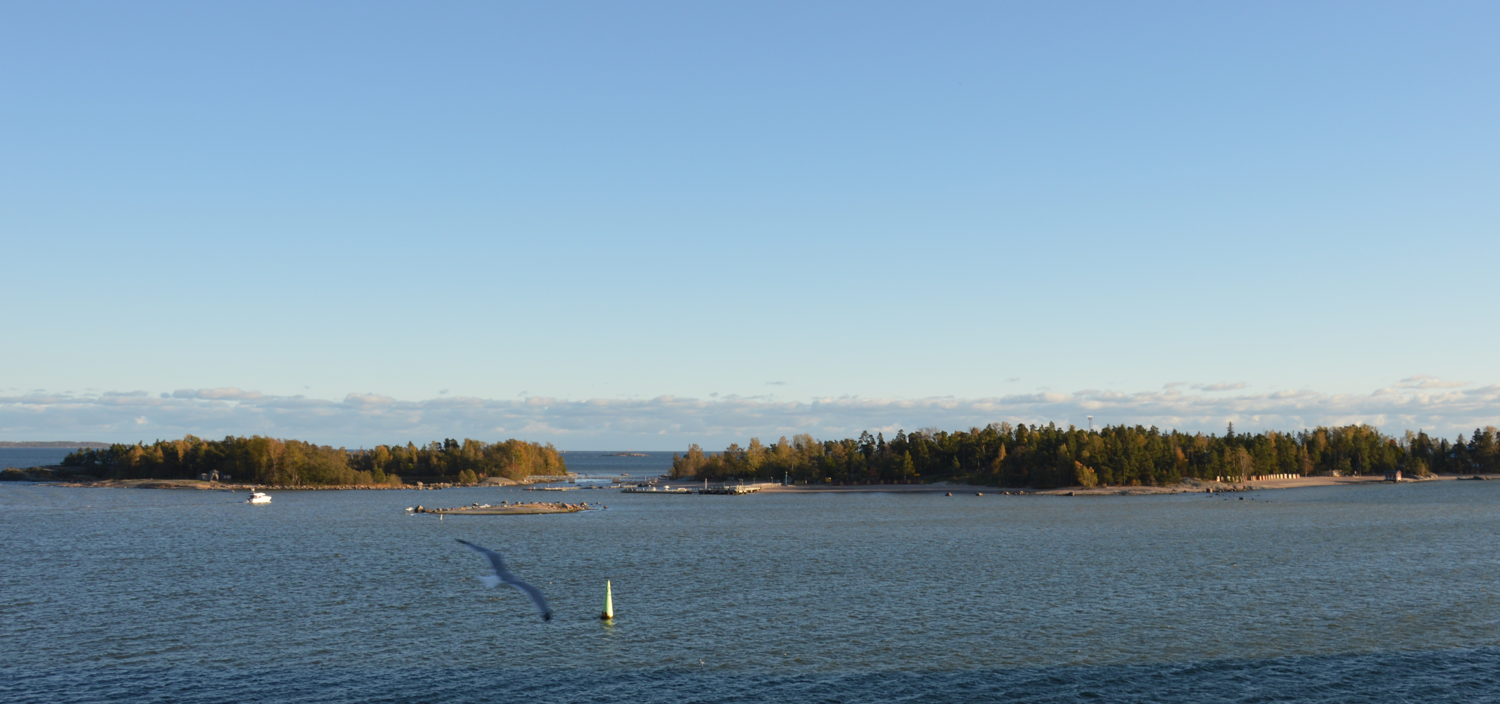 Inseln Pihlajasaari